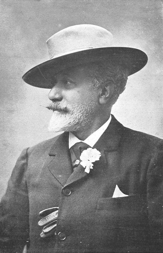 Retrato de Anicet de Pagès de Puig, en la revista española La Ilustració Catalana.